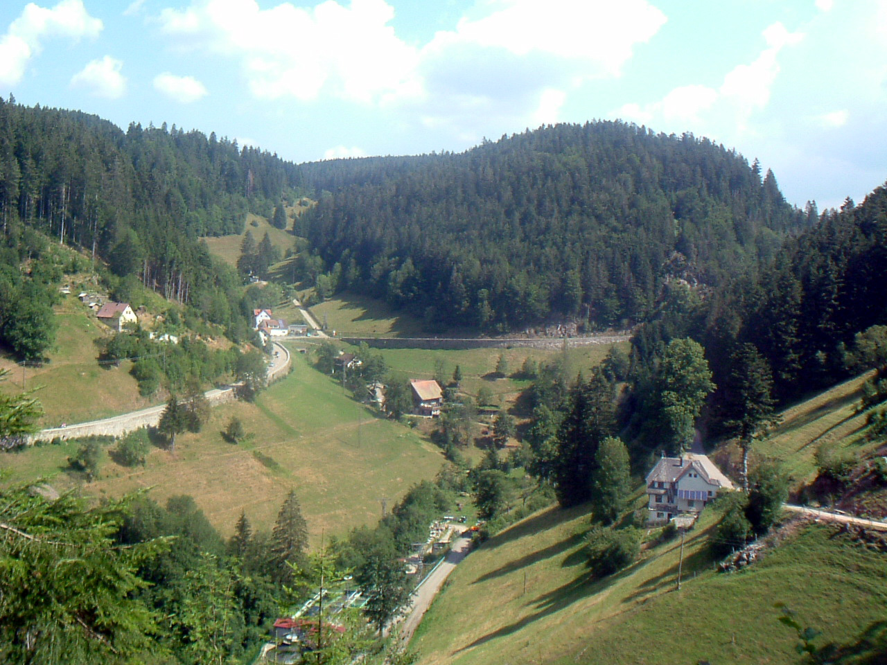 Bei Gütenbach